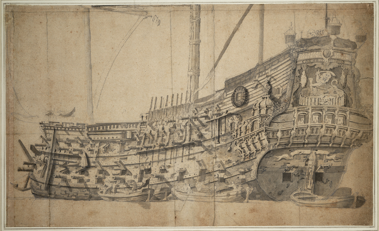 Porträt der Eendracht mit Gefechtsschäden nach der Seeschlacht im Öresund 1658.